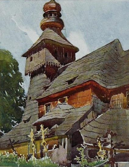 Starobylý valašský kostel svatého Mikuláše v Tiché u Frenštátu. Postaven 1510. Zničen požárem 13. srpna 1964.